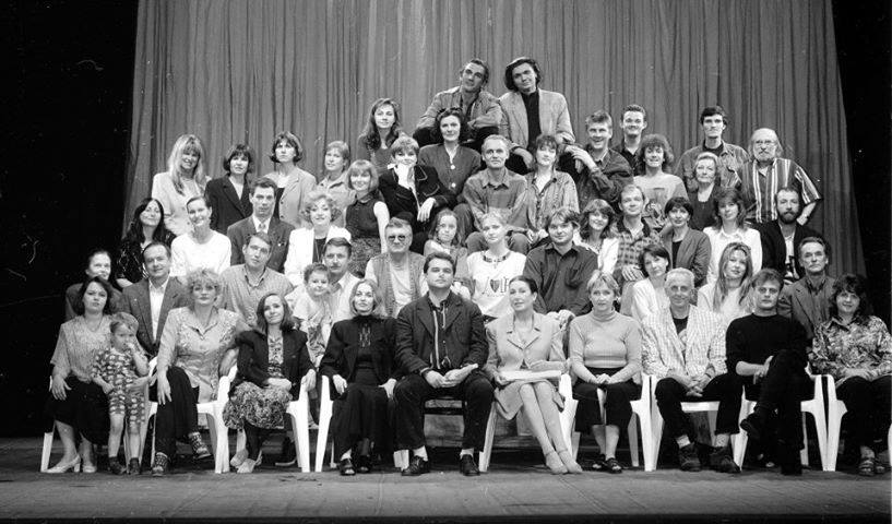 Збір Трупи Молодого театру